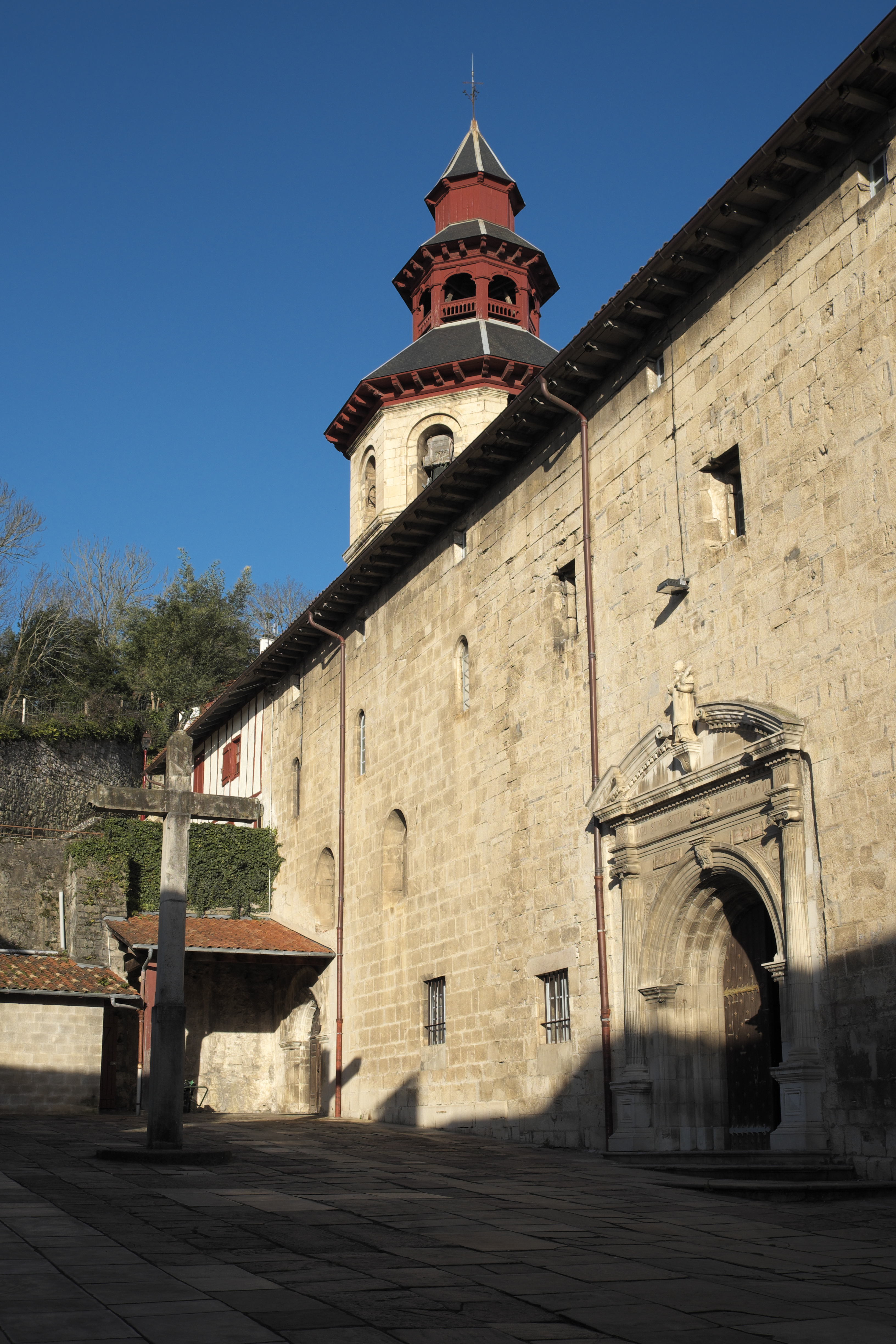 Kirche Saint-Vincent in Ciboure im Département Pyrénées-Atlantiques (Region Aquitaine-Limousin-Poitou-Charentes/Frankreich)